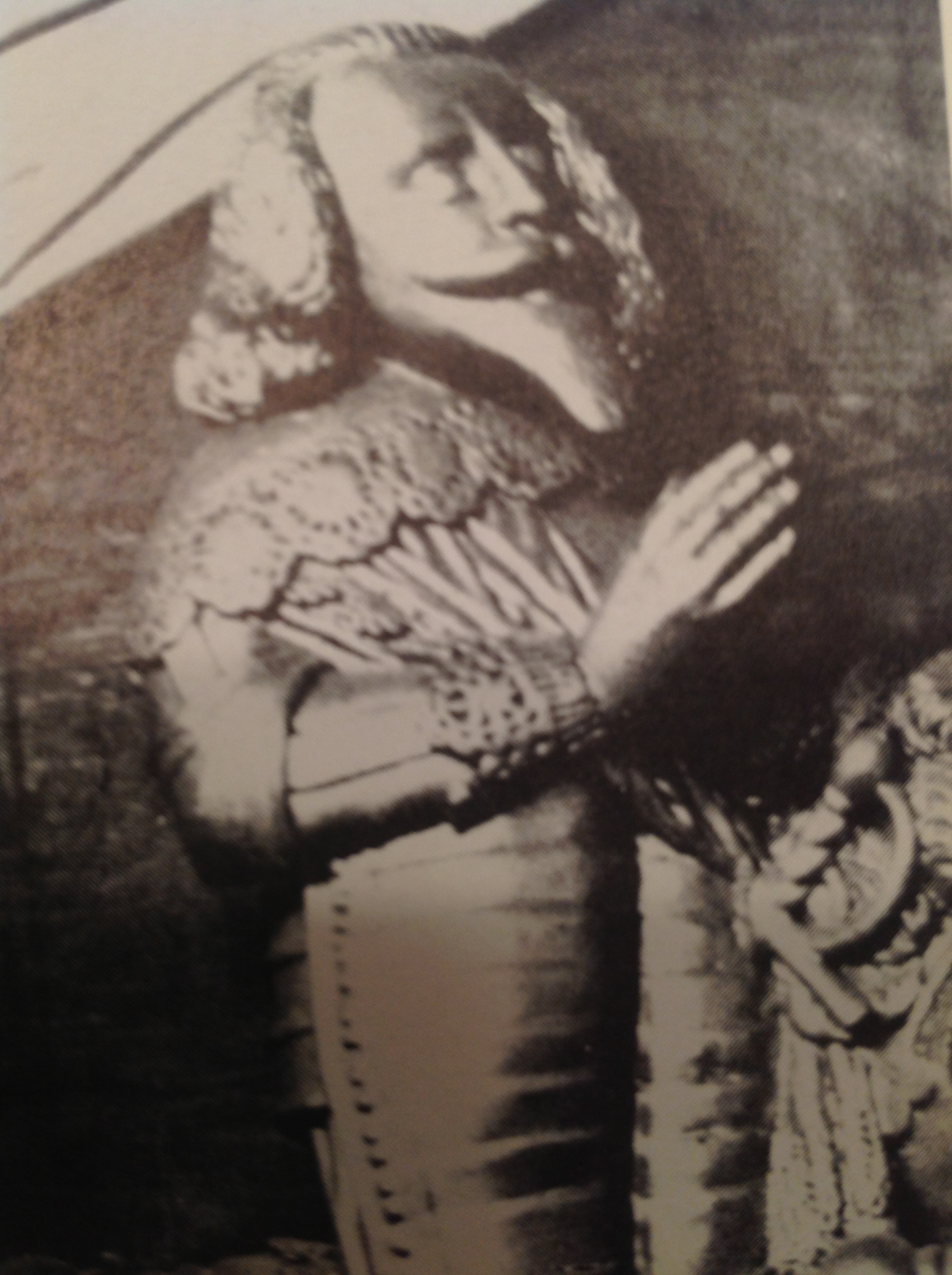 Albrecht Günther (Schwarzburg-Rudolstadt). Die Fotografie wurde im Dezember 2012 erstellt.